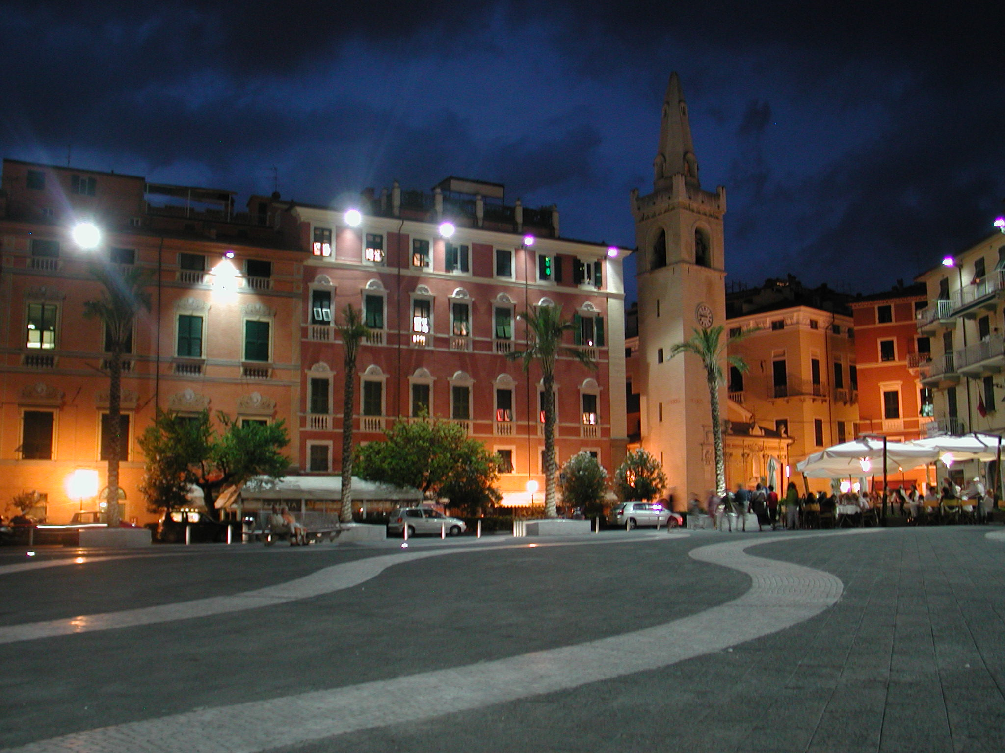 Lerici, Italy